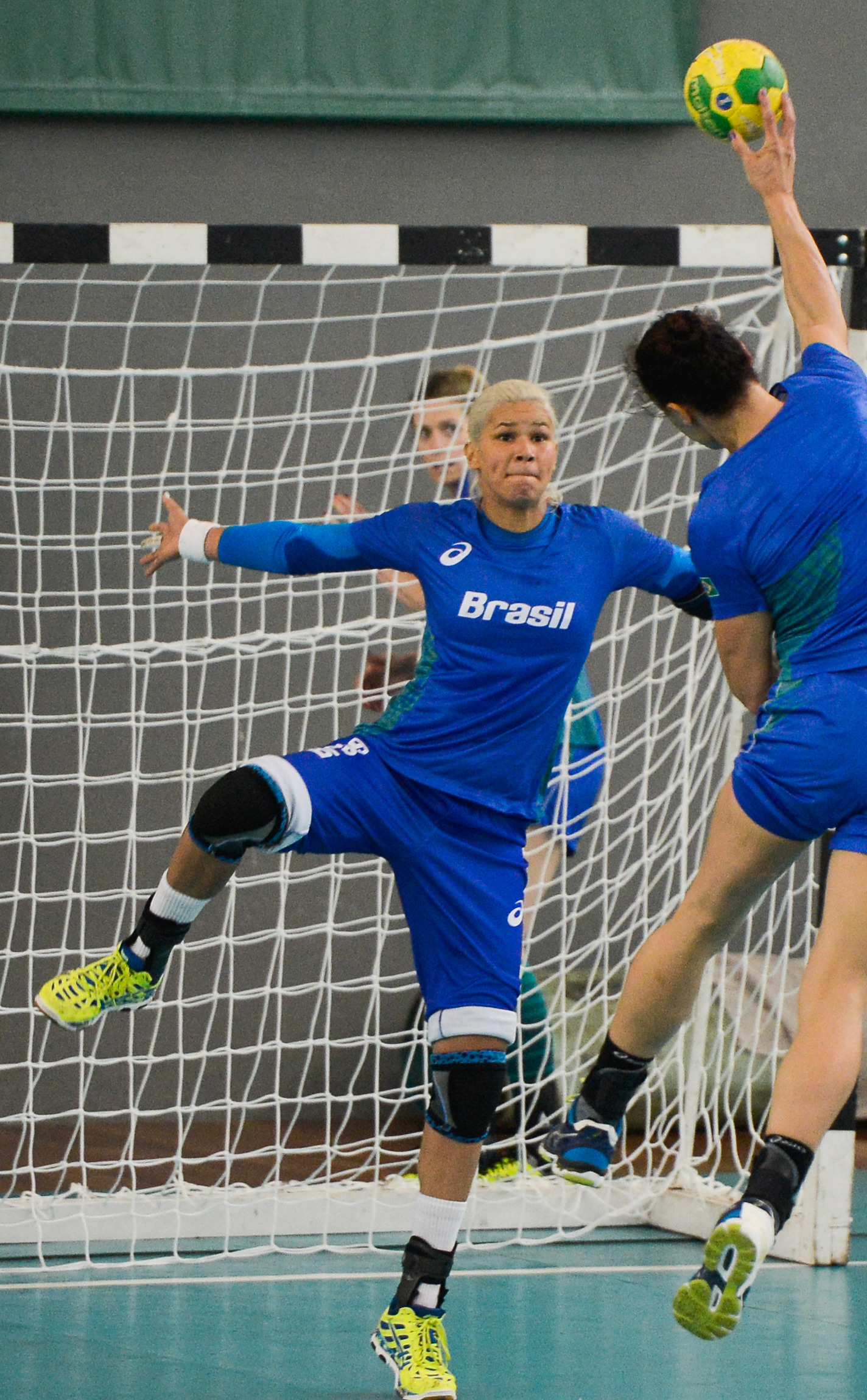 Rio de Janeiro - A Seleção Brasileira Feminina de Handebol faz treino aberto na Escola de Educação Física do Exército, na Urca, zona sul da capital (Tomaz Silva/Agência Brasil)